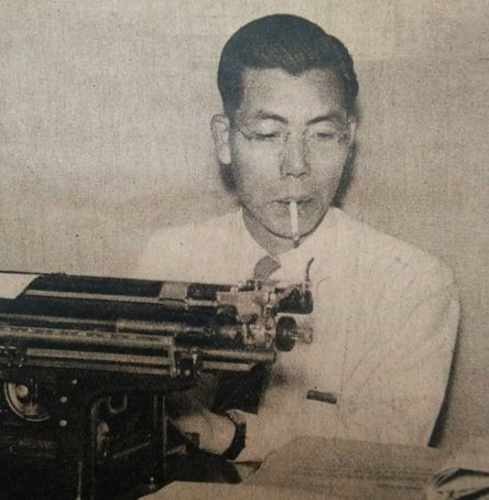 清川正二